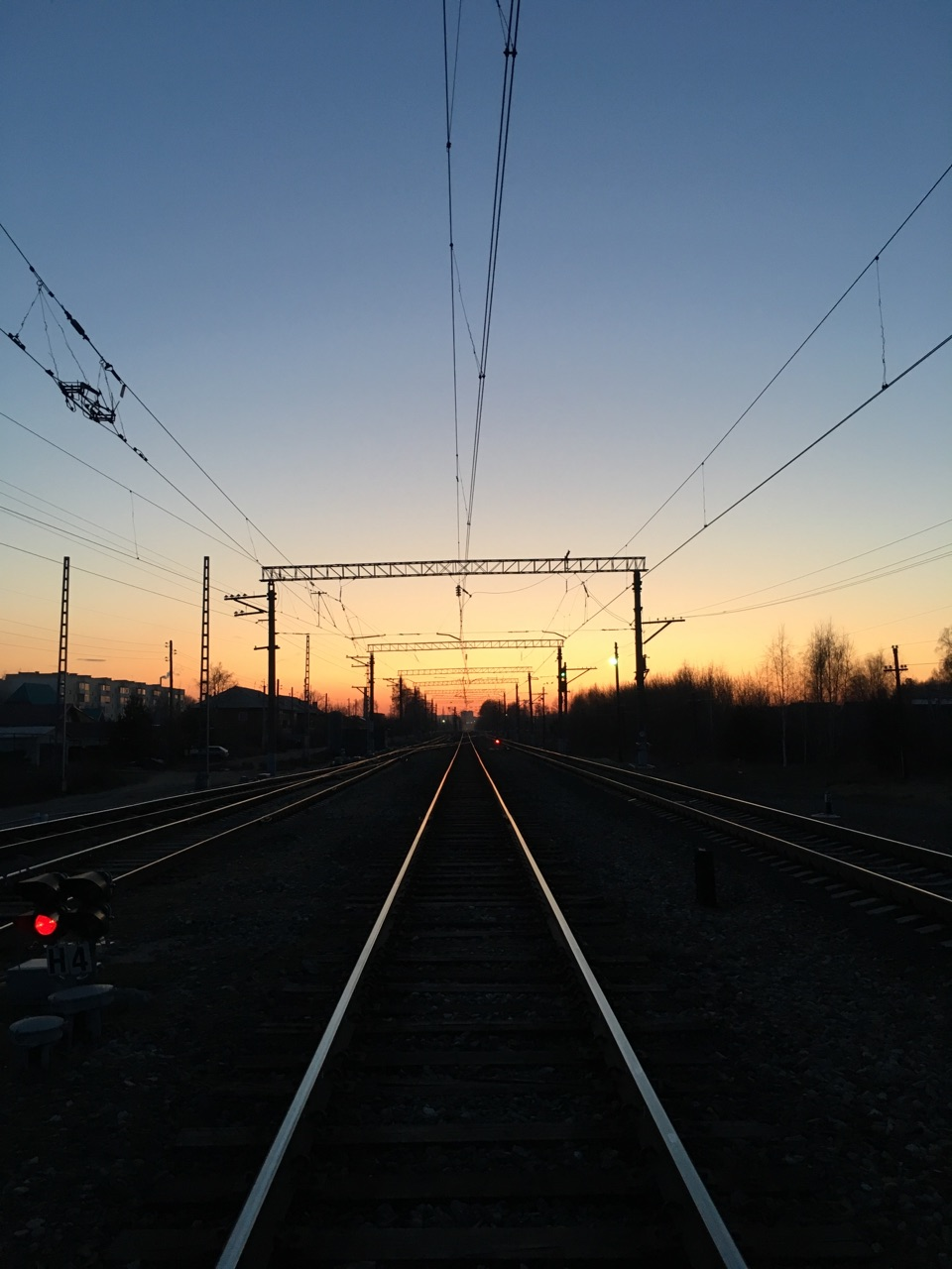 Новое Аракчино, вид в сторону Юдино